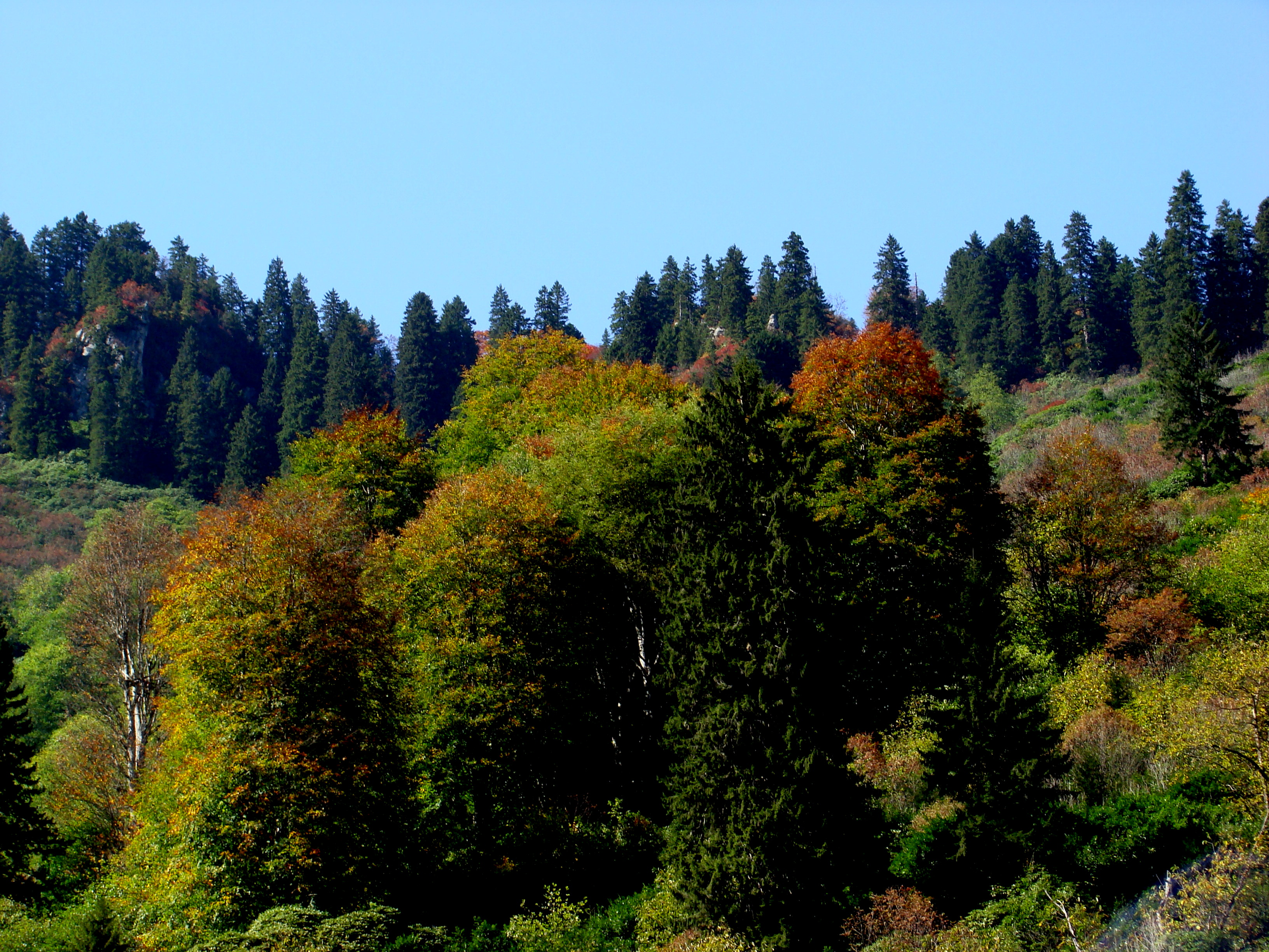 Doğu Karadeniz ve Orman (Sonbahar)